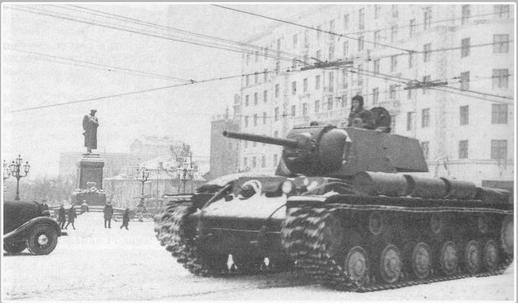 Лейтенант П. Д. Гудзь на своём танке КВ-1 движется в сторону Красной площади для участия в Военном параде 7 ноября 1941 года.